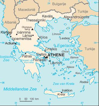 Bewerking van nl::Afbeelding:Kaart Griekenland.png.